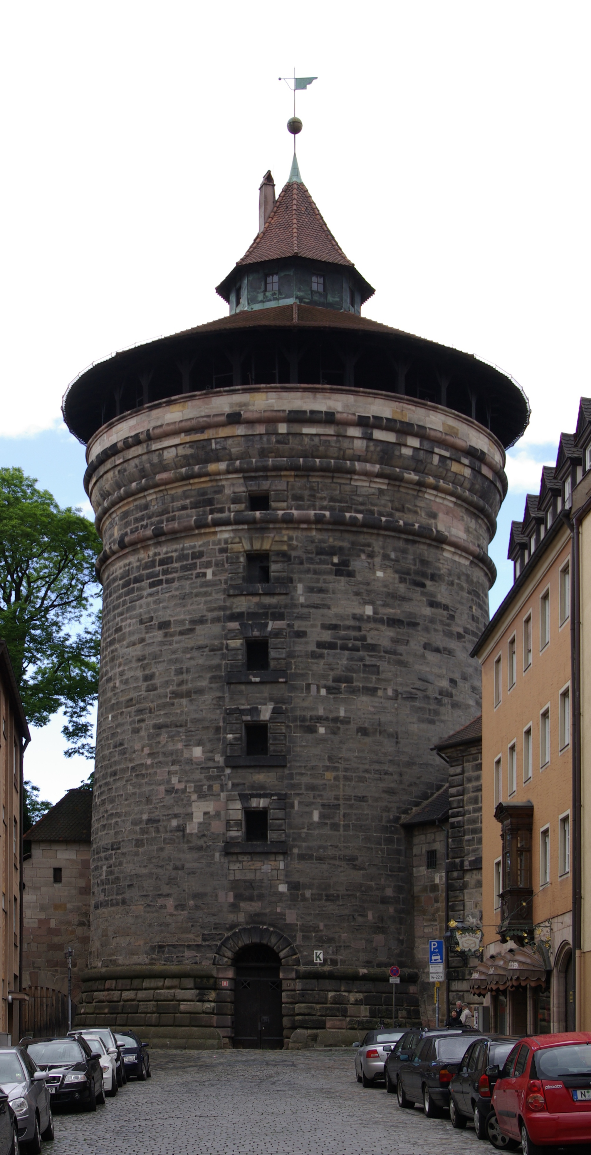 Neutorturm in Nürnberg